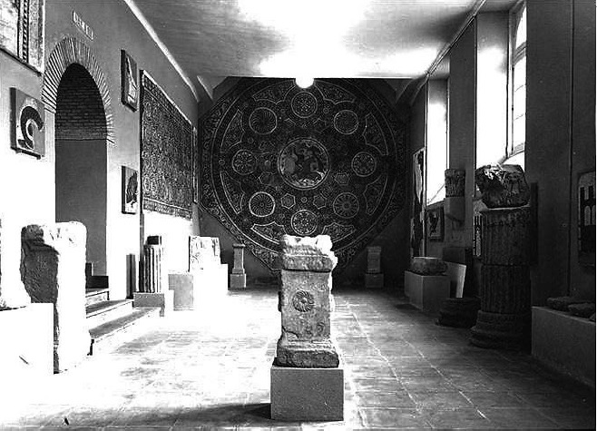 Foto-Archivo Institución Príncipe de Viana- Sala en su inauguración en 1956